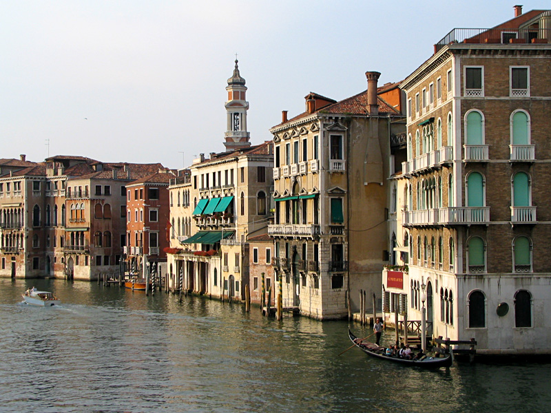 Вид на Гранд-канал в Венеции